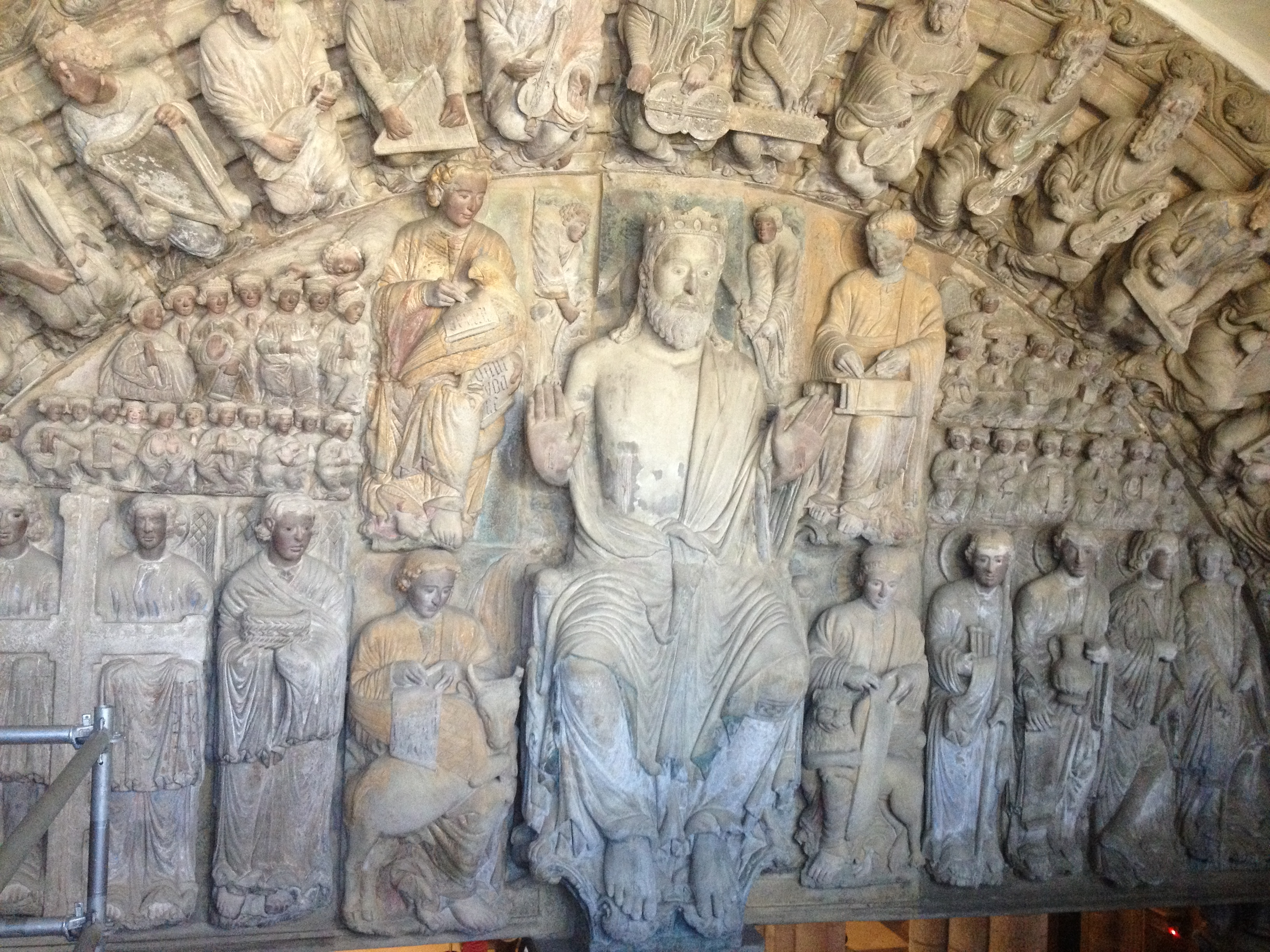 Tímpano central del pórtico de la Gloria. Catedral de Santiago de Compostela.